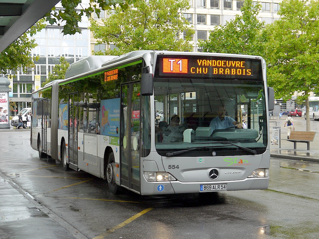 Mercedes Citaro G au gaz naturel du réseau de Nancy, sur un service de substitution à la ligne TVR